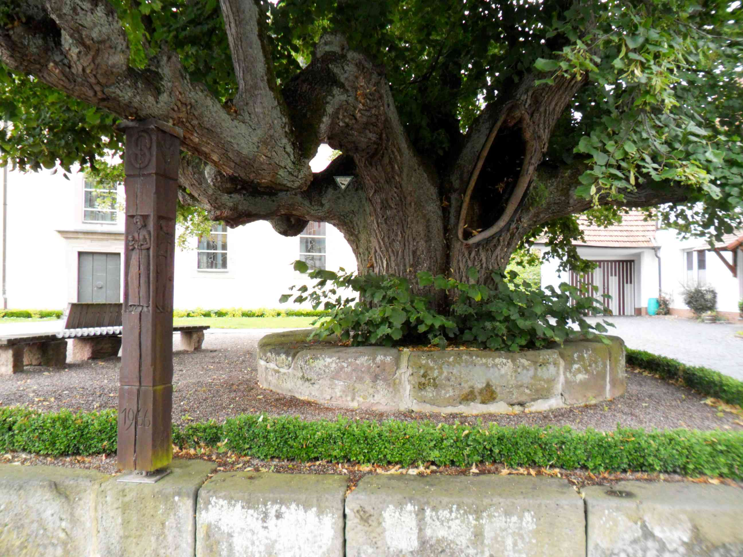 Ransbach – (Kreis Hersfeld-Rotenburg; Bundesland Hessen); Ransbach-Gerichtsplatz mit Linde (Steineinfassung und Holzstützen) im Vorfeld der Kirche-20072012